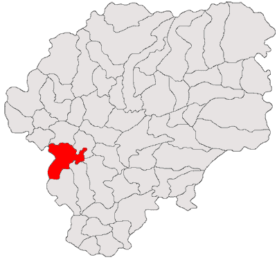 Categorie:Hărţi ale judeţului Bistriţa-Năsăud